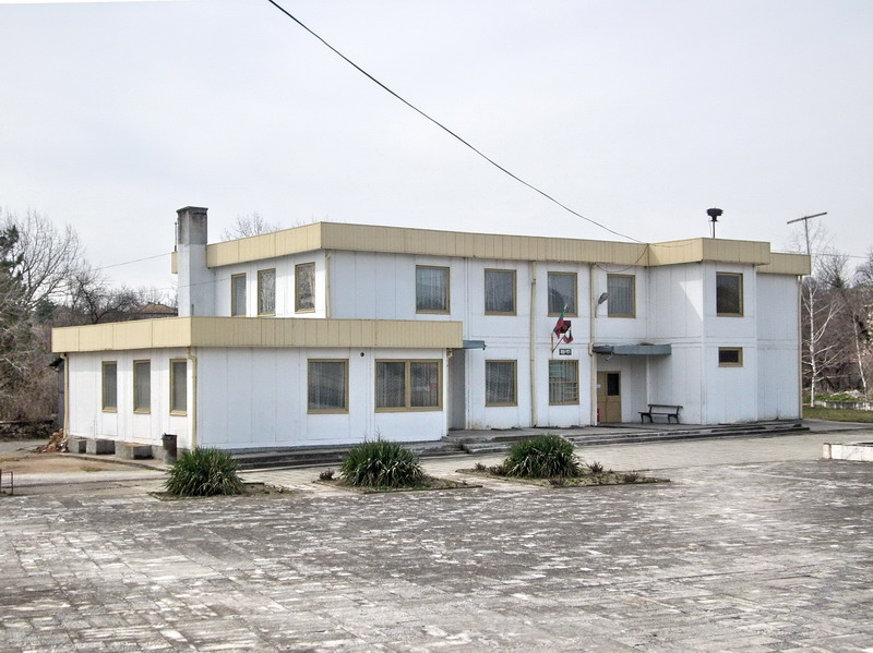 Село Ковачевец, община Попово. Кметството